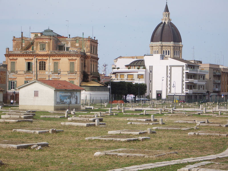 Veduta delle Fosse Granarie di Cerignola